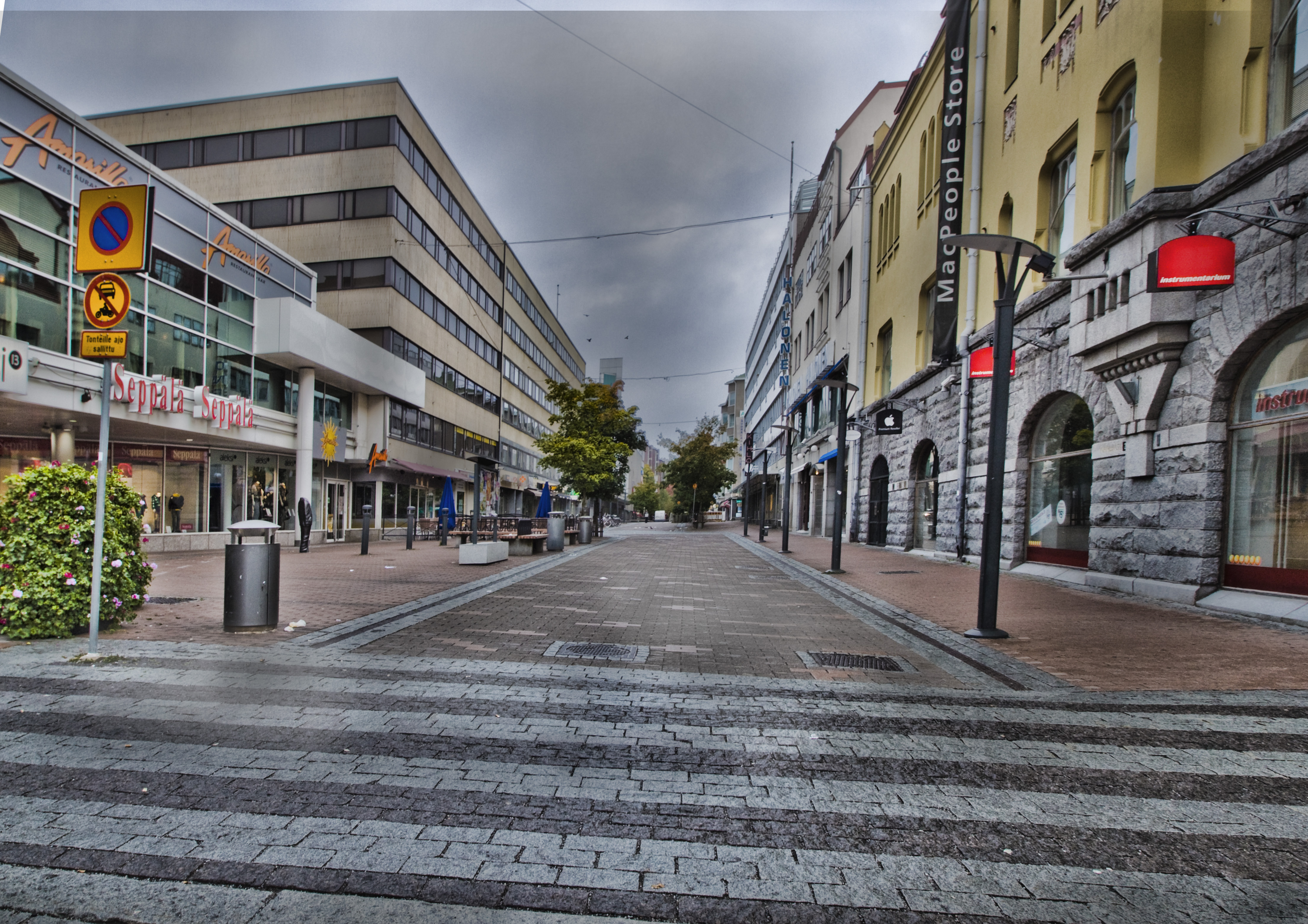 Kuninkaankadun kävelykatu